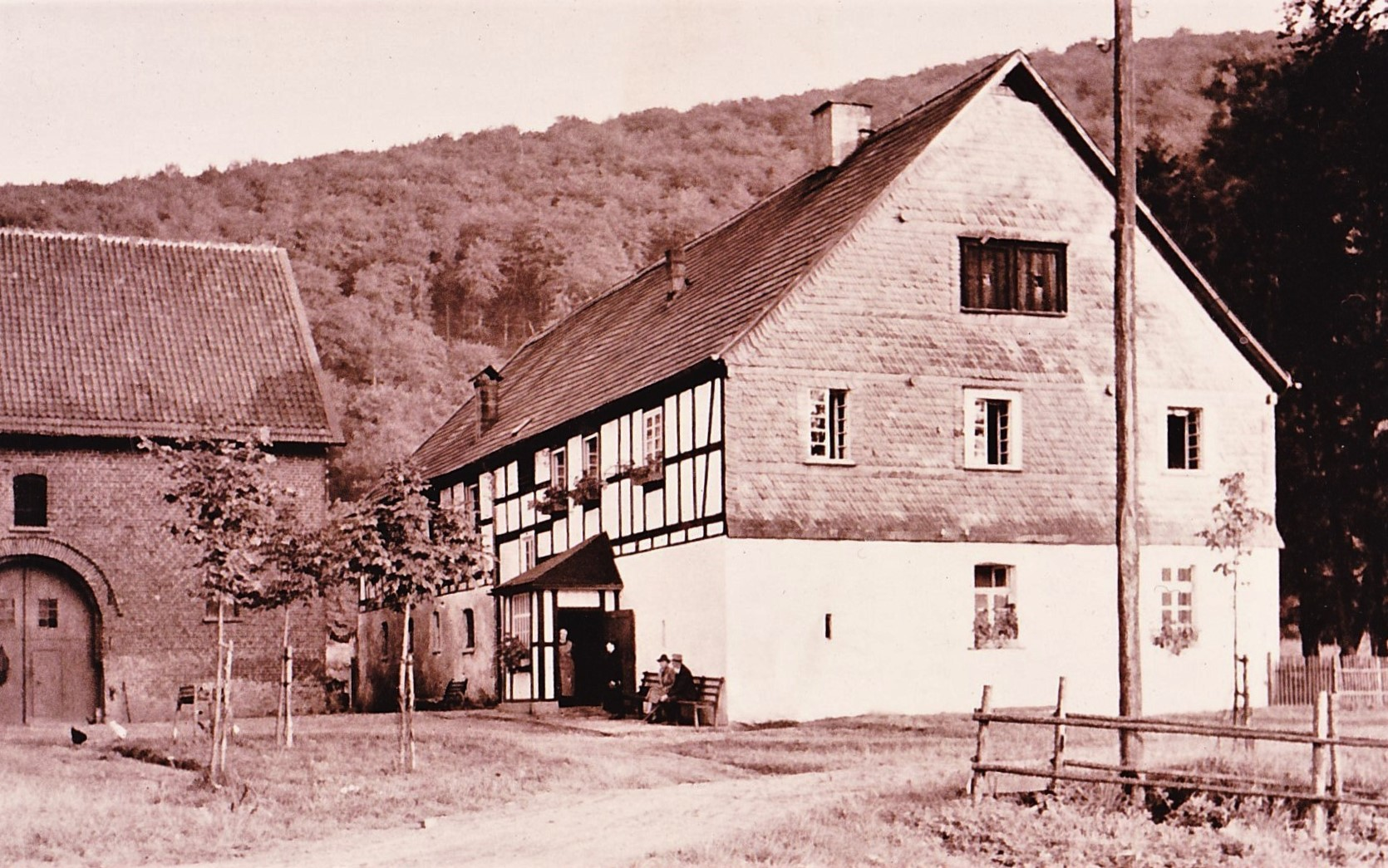 Das ehemalige Rittergut Langenohl lag 625 m westlich der Waldenburg im breiten Biggetal, also auf einem „langen Ohl“. Erste urkundliche Erwähnung 1249 als Besitz der Grafen von Arnsberg (WUB VII 690). Am 29. April 1284 tauschte Ehrenfried von Bredenol mit dem Grafen Ludwig von Arnsberg seinen Hof Verse im Kirchspiel Herscheid gegen den Haupthof Langenohl (curia Langenole) bei Waldenburg (WUB VII 1902). Im 16. Jahrhundert gehörte das Gut, auf dem der Schulte zu Langeoel sitzt, dem adeligen Geschlecht Hoberg (Waldenburg). Laut Türkensteuerliste von 1563 hatte Johann zu Langenoel 2½ Goldgulden, sein Knecht 1 Ort (¼ Gg) zu entrichten. 1670/73 ging mit dem Waldenburger Besitz auch das Gut Langenohl auf die von Fürstenberg über. Bewirtschaftet ab Ende des 18. Jahrhunderts von der Familie Kampschulte, danach bis 1961 von der Pächterfamilie Marcus. Gut Langenohl hatte 1921 eine Größe von 157 ha, davon 107 ha Wald. Die Hofgebäude wurden 1961 abgerissen um der Biggetalsperre Platz zu machen.